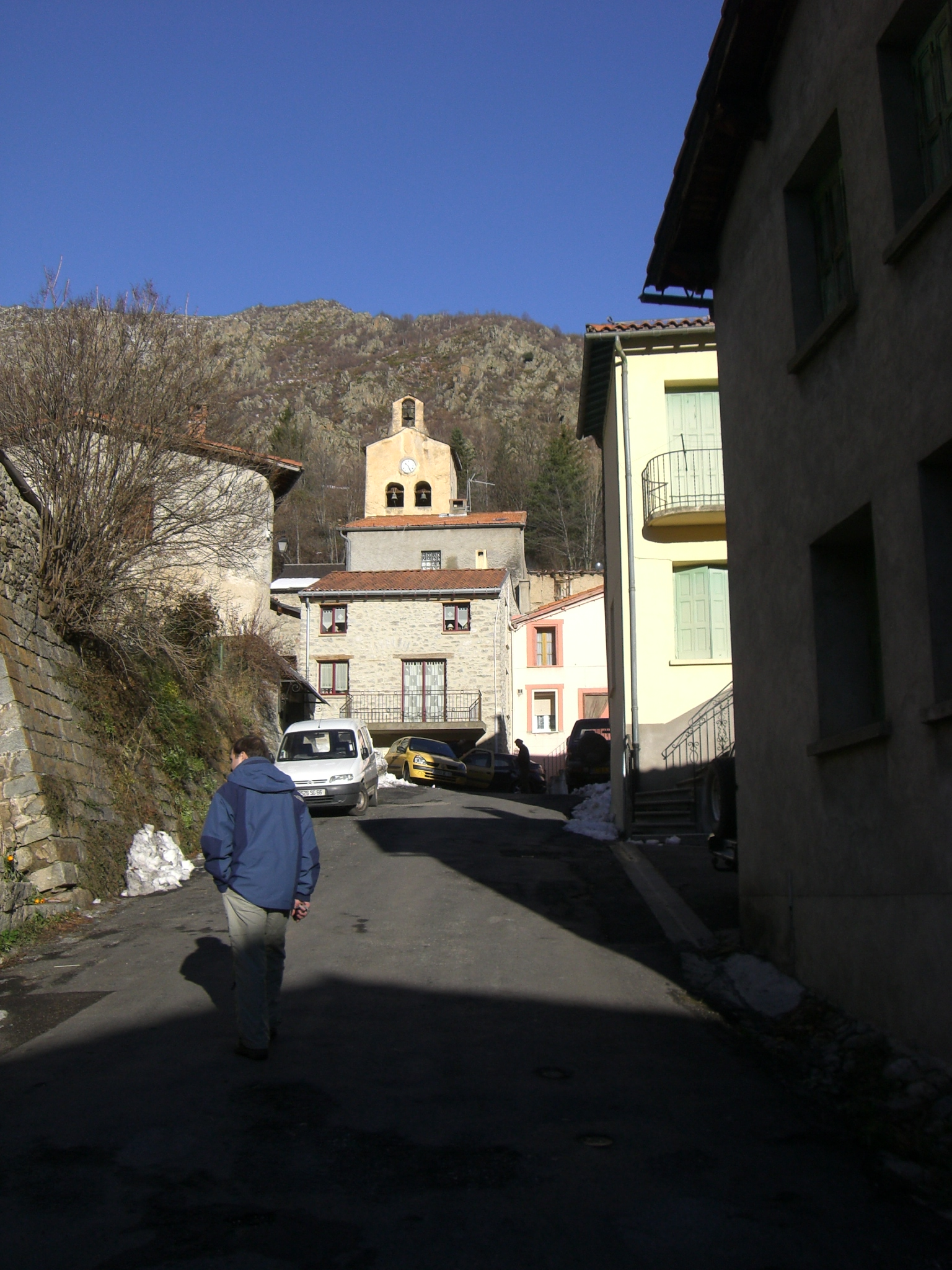 Pi de Conflent